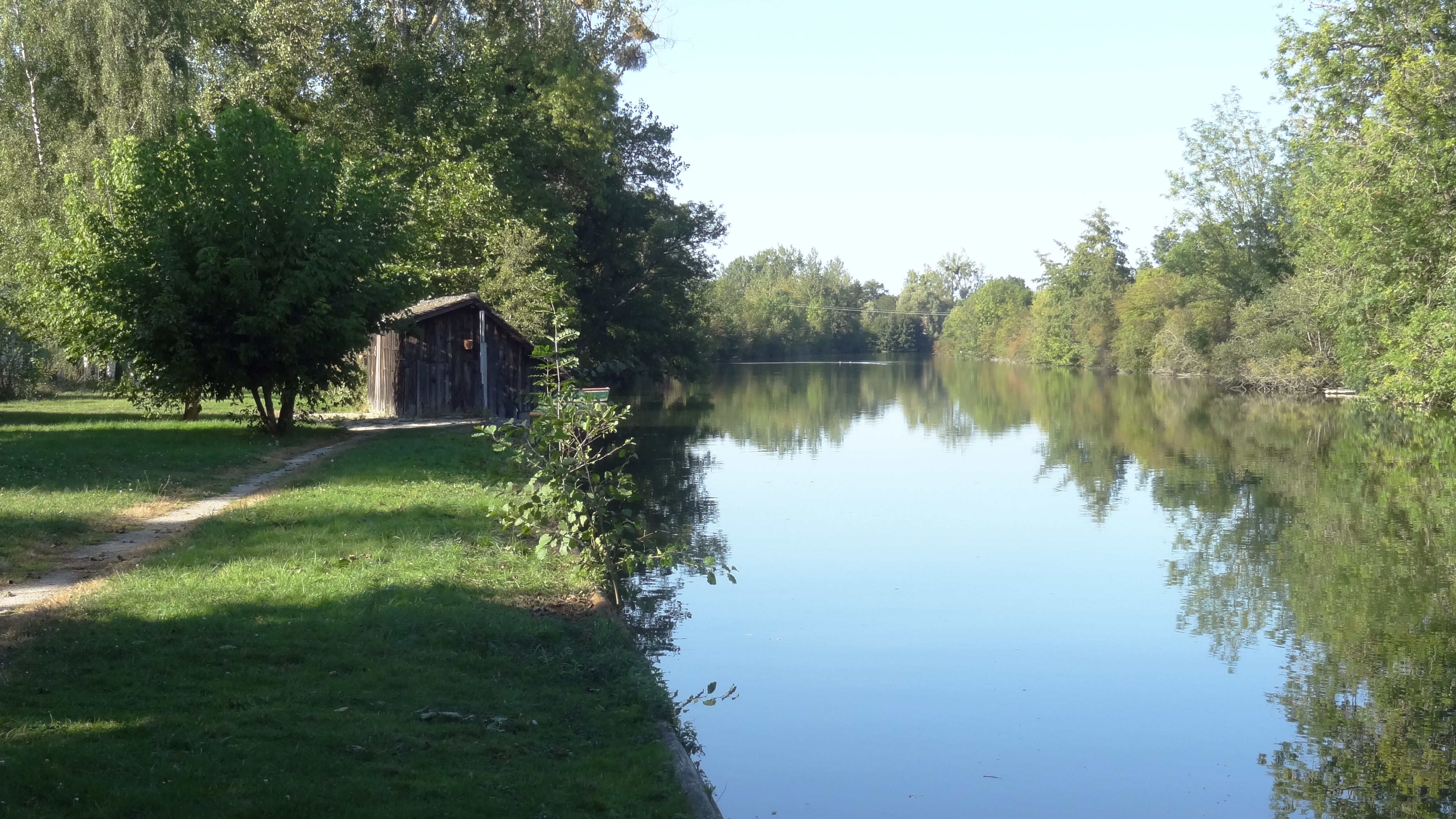 Le Loir à Saint-Hilaire-la-Gravelle derrière la mairie